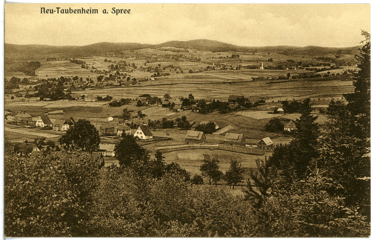 Neutaubenheim; Blick auf Taubenheim an der Spree This postcard is from publisher Brück & Sohn in Meißen ( postcard has a unique number 23268 and is available in a higher resolution at the publisher. This images was uploaded in a cooperation project between Wikipedians and the publisher.